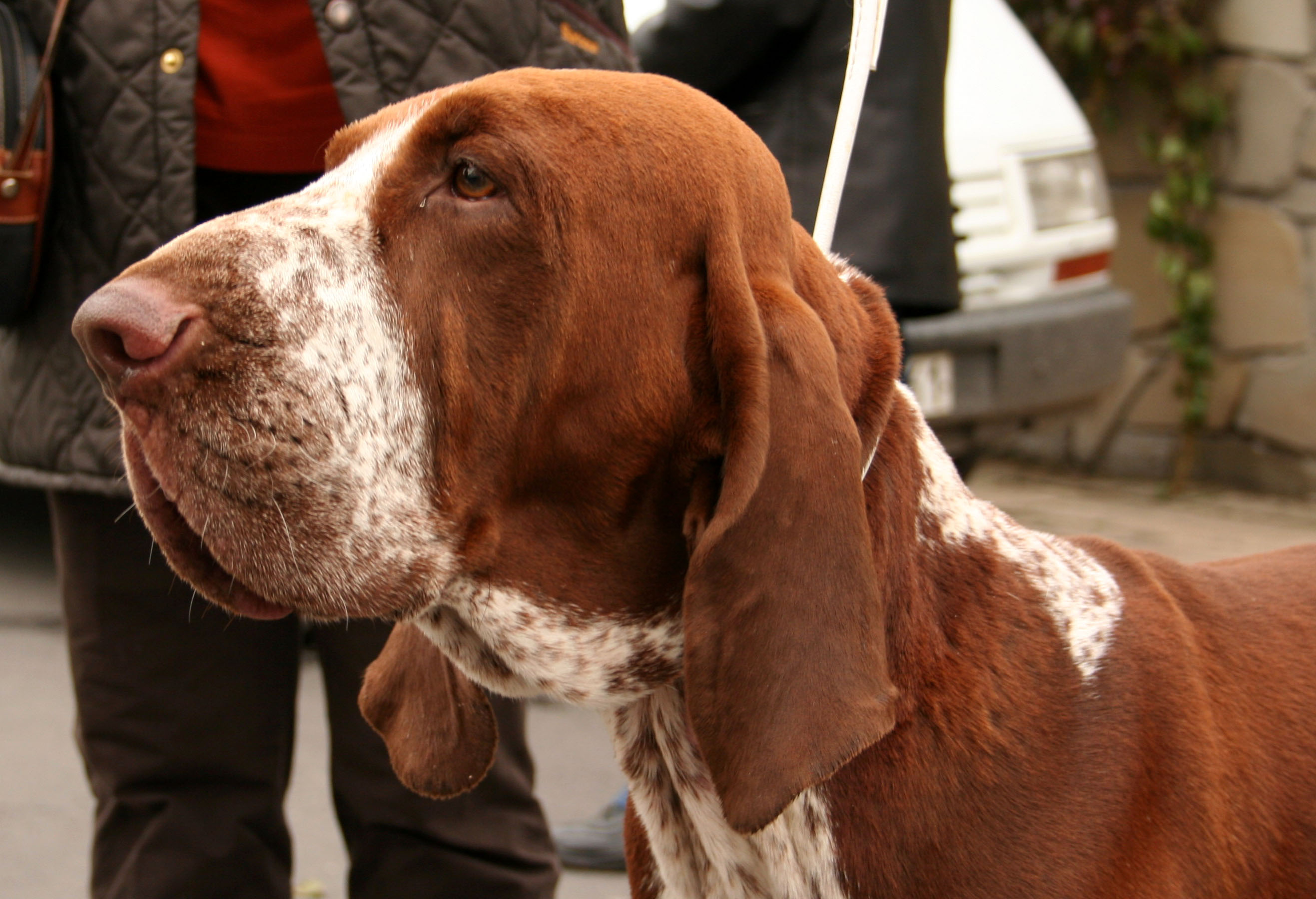 Bracco_italiano na Światowej Wystawie Psów Rasowych w Poznaniu